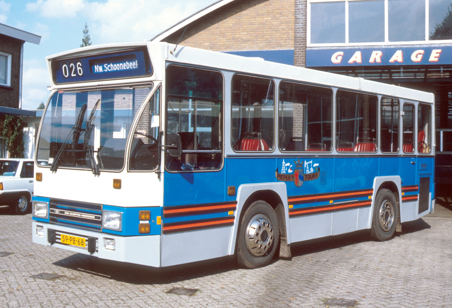 Pieper uit Nieuw-Schoonebeek bus 49 (ex NZH: 7031) van het type Den Oudsten B79-M380\Mercedes Benz te Nieuw-Schoonebeek.